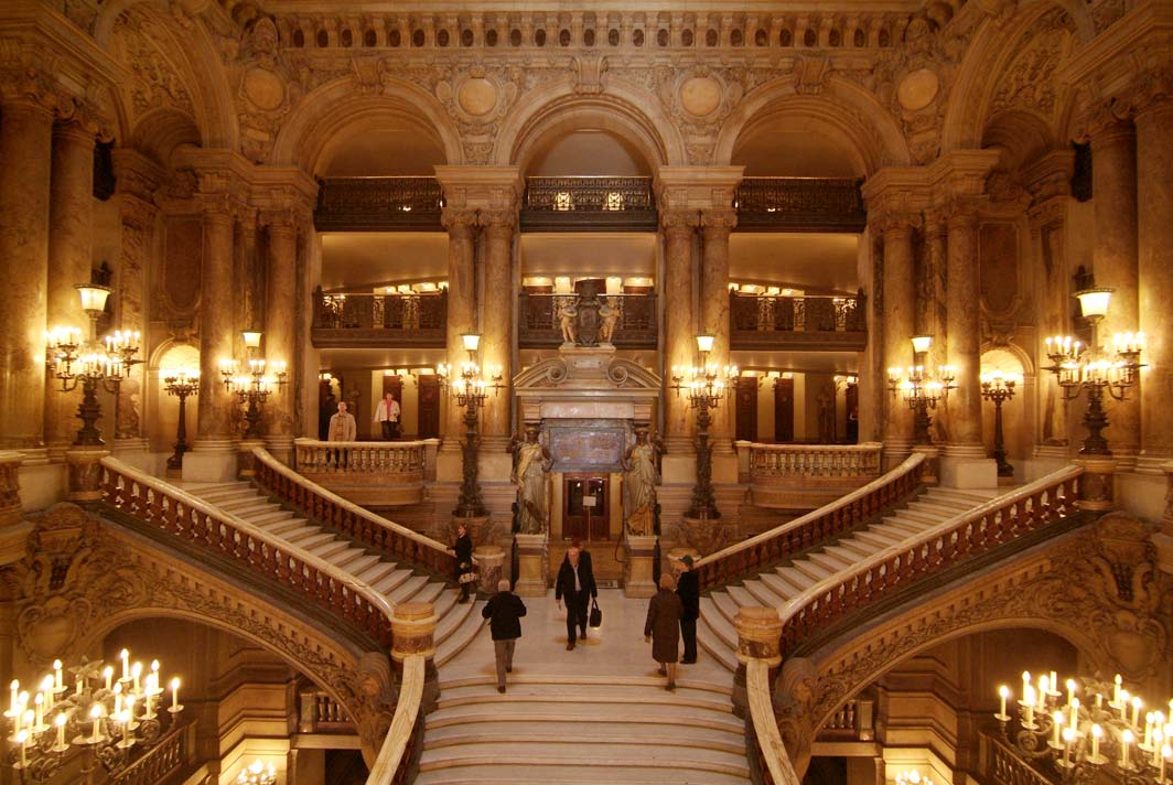 Grand staircase of the Garnier Opera House, Paris / Grand escalier de l’opéra Garnier, à Paris